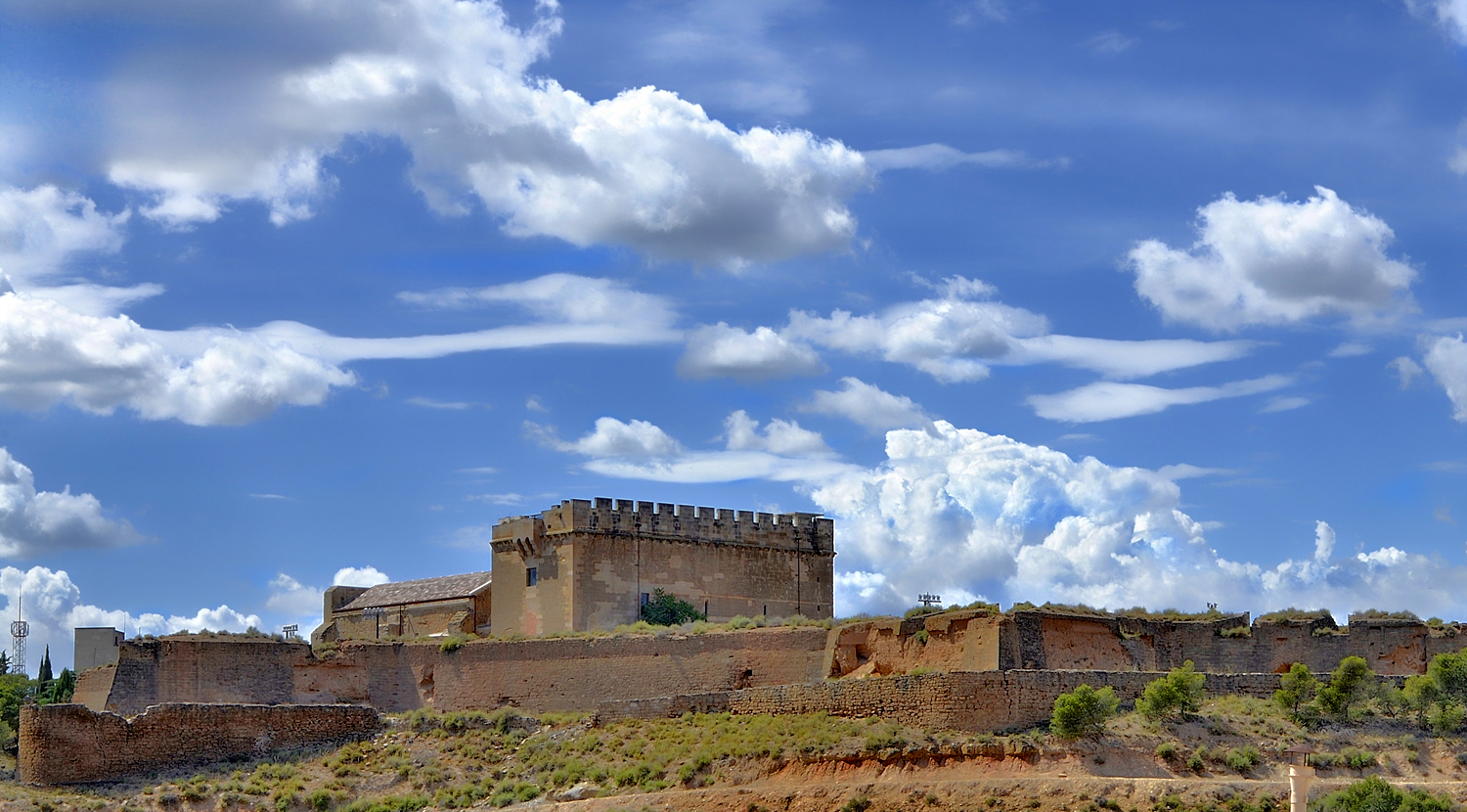 Arquitectura templaria de los siglos XII y XIII